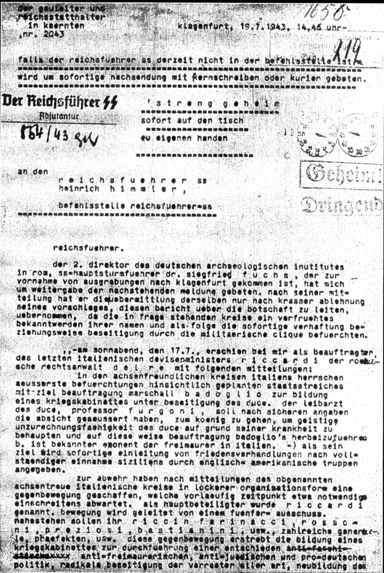 Rapporto informativo delle SS inviato ad Heinrich Himmler dal centro di Klagenfurt il 19 luglio 1943, una settimana prima della destituzione di Benito Mussolini con l'Ordine del giorno Grandi. Si riferisce che secondo la fonte Siegfried Fuchs, allora vicedirettore dell'Istituto Archeologico Tedesco in Roma (in realtà capitano delle SS medesime), erano in corso manovre per destituire Mussolini e sostituirvi Pietro Badoglio, che avrebbe formato un gabinetto di guerra; in più punti del documento si fa riferimento all'intervento del Re (Vittorio Emanuele III) ed alla massoneria cui Badoglio aderiva. 2 giorni dopo, il 19 luglio, Mussolini avrebbe incontrato Hitler (Incontro di Feltre); al rientro dall'incontro Mussolini accettò di convocare il Gran Consiglio del Fascismo che lo avrebbe di fatto destituito, fissandone la data per la sera del 24. Il documento ha il timbro "Geheim!" (segreto); l'immagine è estratta in negativa da copia microfilmata di bassa qualità grafica.